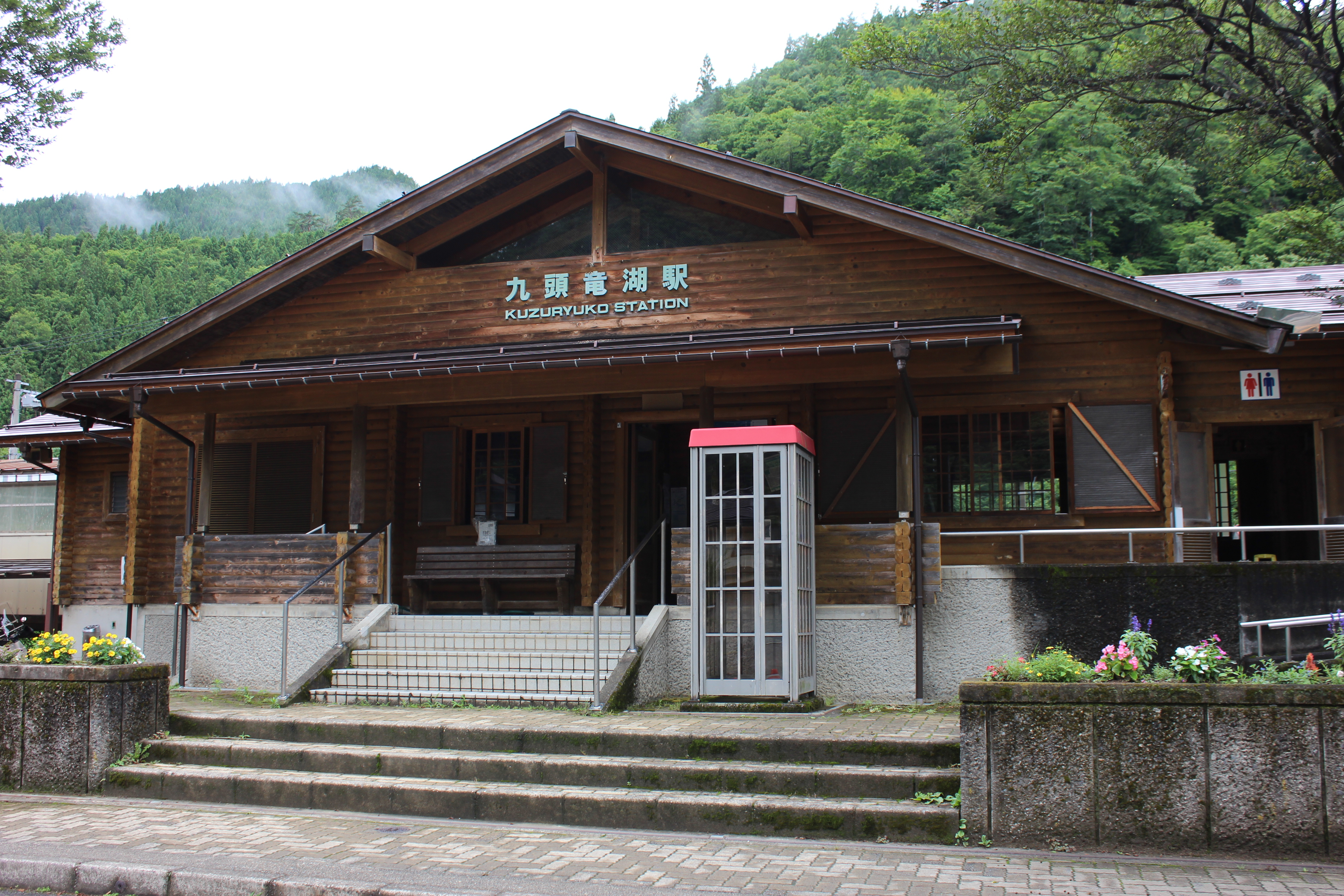 九頭竜湖駅（福井県大野市） Canon EOS Kiss X5